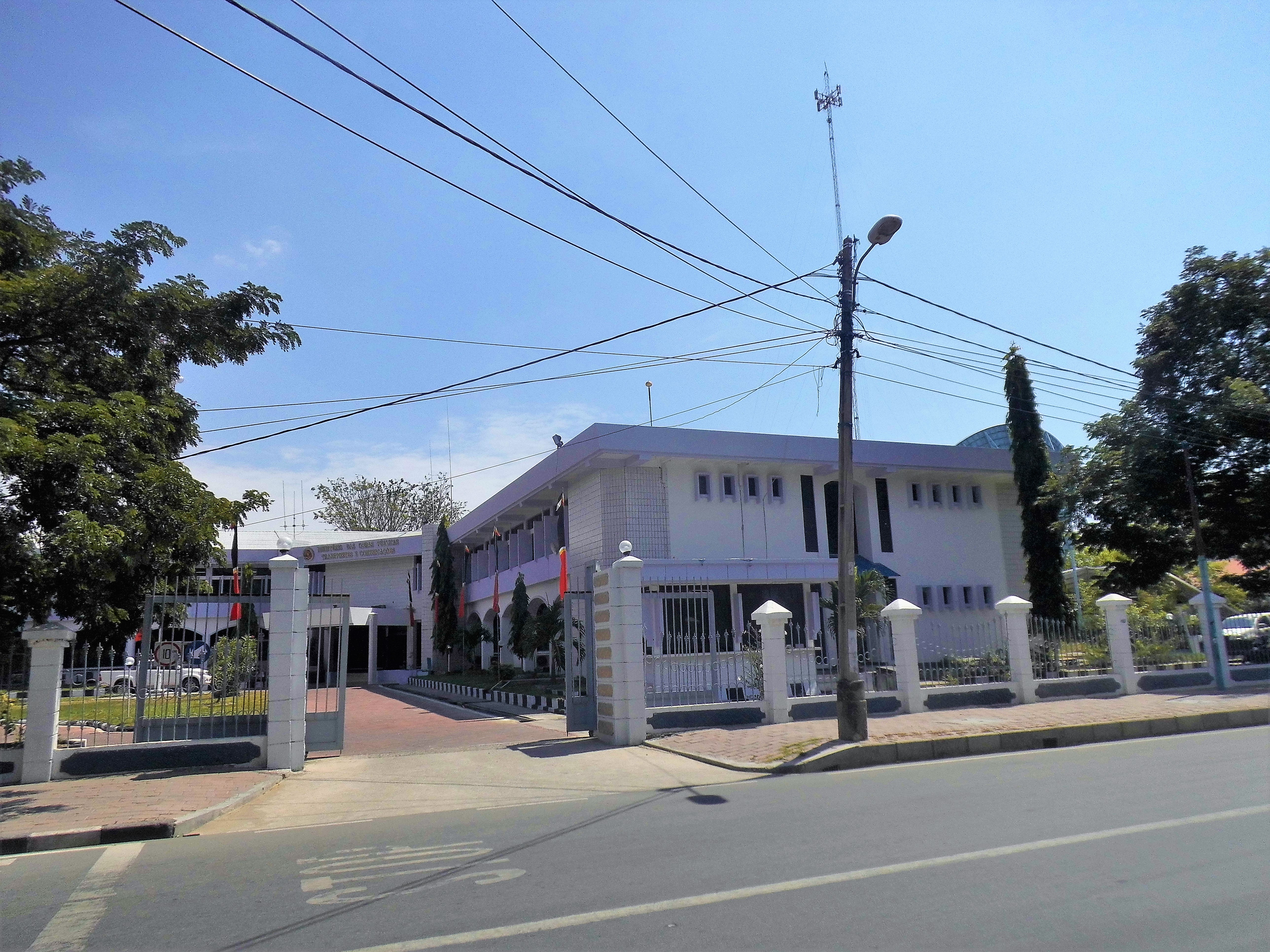 Generaldirektion Transport und Kommunikation